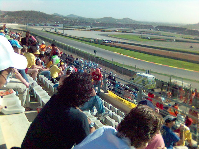 Valenca Ricardo Tormo MotoGP 2006